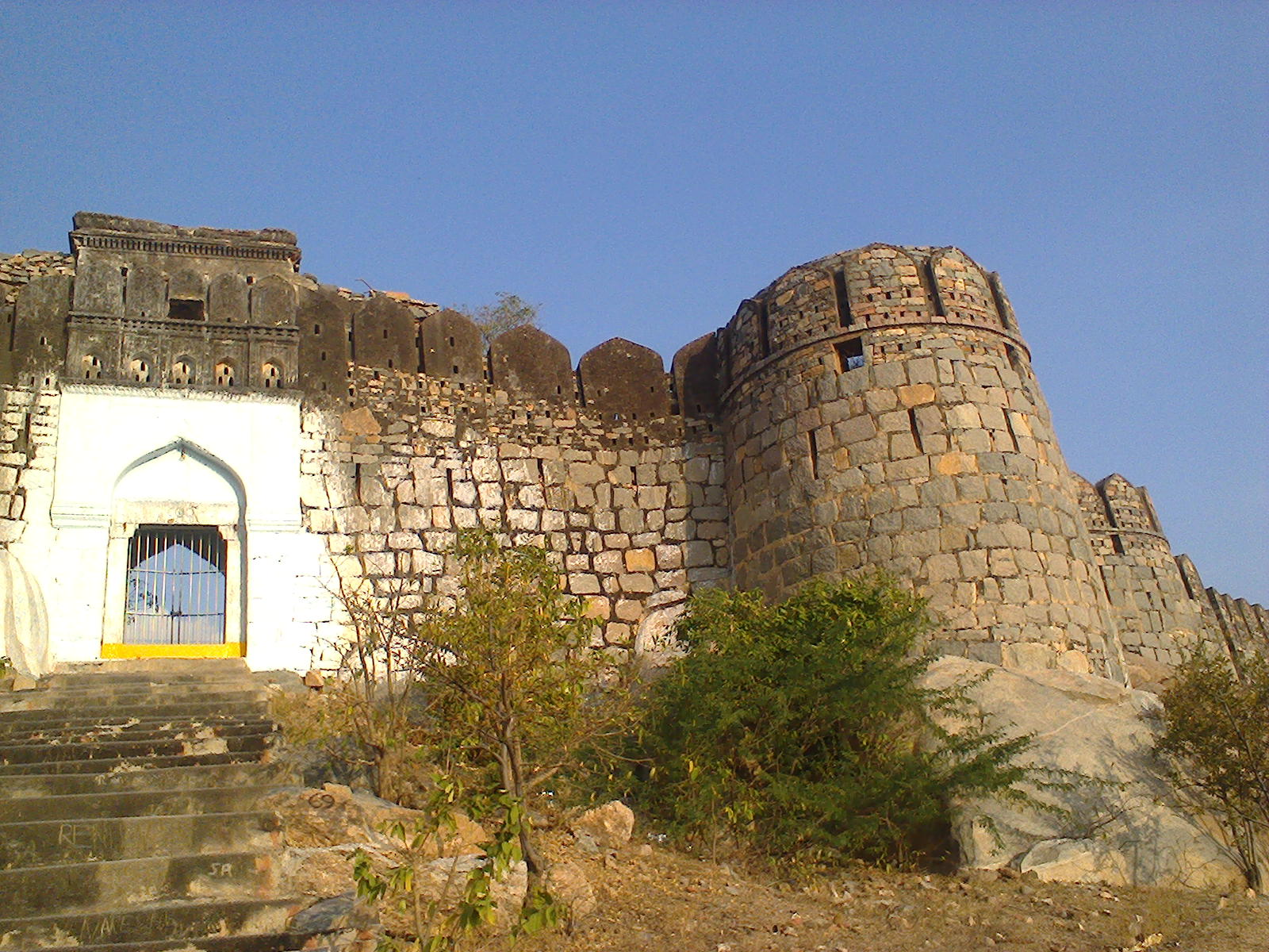 లోపలి కోట ప్రవేశ మార్గం